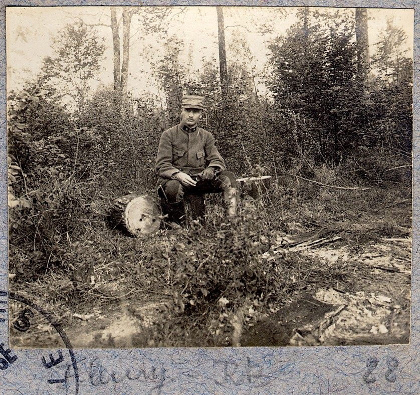 Raoul Berthelé pose assis sur des rondins de bois dans une clairière à Fleury-sur-Aire (Meuse). 1916. Guerre 1914-1918.